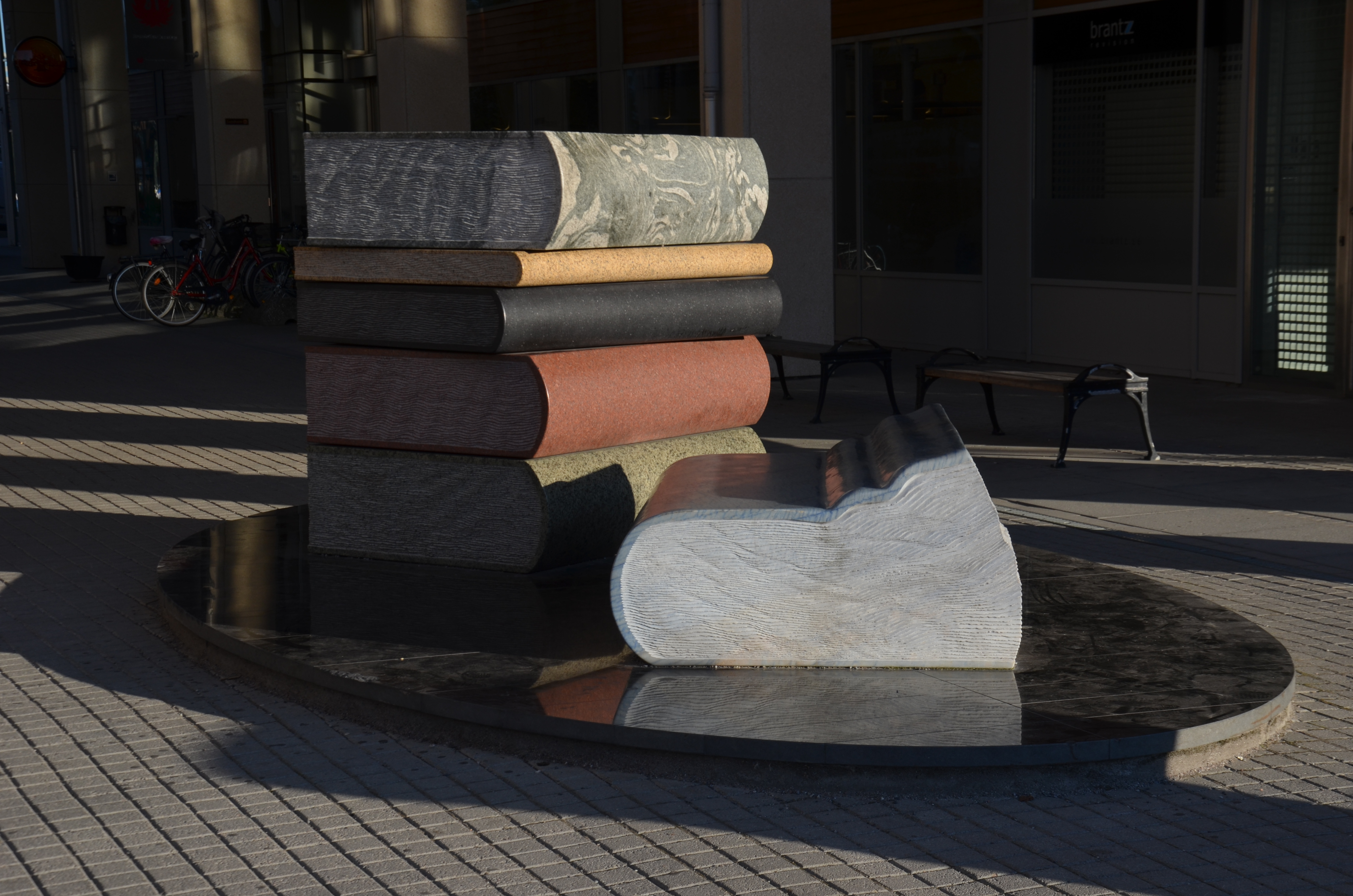 Anna Kubach-Wimsen och Wolfgang Kubach-Wimsen La storia della terra, Årstadal i Stockholm, 2000